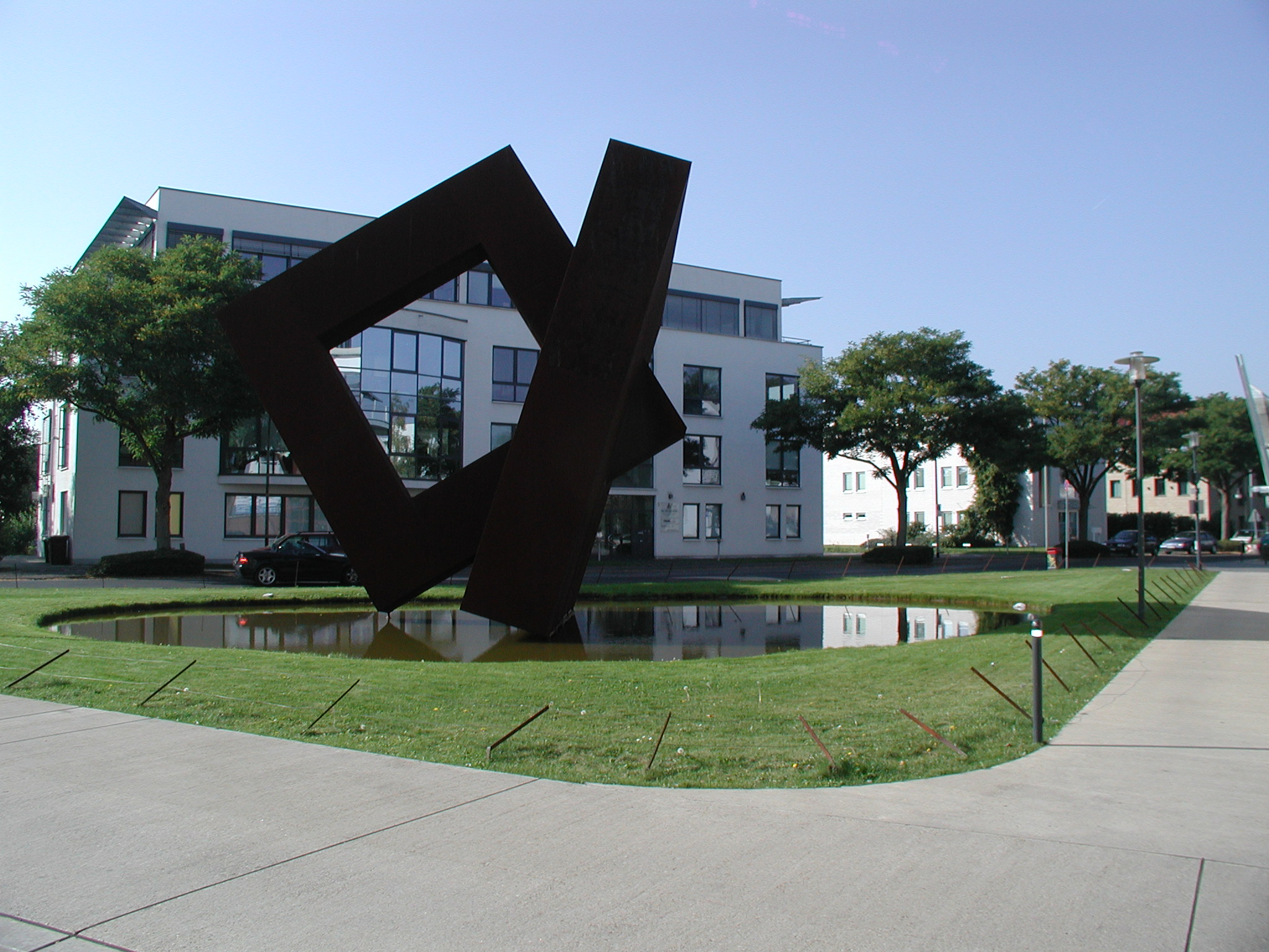 Huerth-Efferen-Medienzentrum